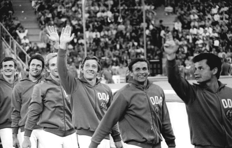 ADN-ZB-Olympiadienst-Kohls 30.8.72 München: XX Olympische Sommerspiele-Turnen: Froh gestimmt verläßt die DDR-Riege am späten Abend des 29.8.1972 die olympische Wettkampfstätte. Im Mannschaftskampf wurde die Bronzemedaille mit 559,70 Punkten erkämpft. V.r.n.l.: Trainer Perter Weber, Klaus Köste, Reinhard Rychly, Jürgen Packe, Matthias Brahme und Wolfgang Klotz. Wolfgang Thüne nicht im Bild. Die DDr-Riege steigerte sich gegenüber dem Pflichtergebnis um 7,10 Punkte. Mit großem Kampfgeist erzielte sie eine geschlossene Mannschaftsleistung.